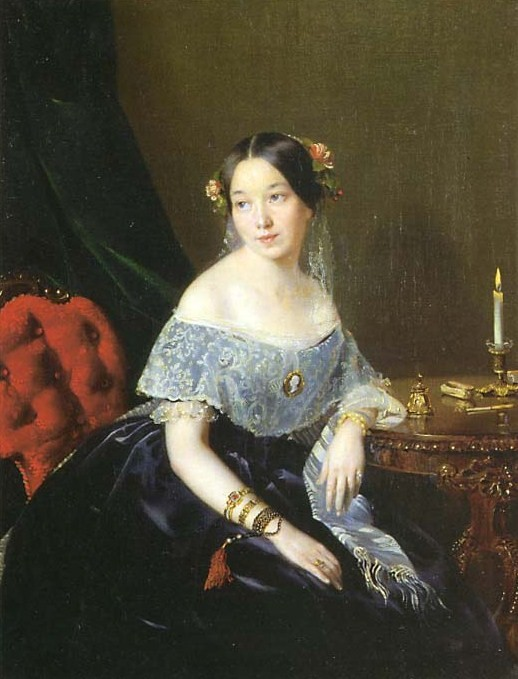 Варвара Петровна Самсонова, ур. Озерова (1818—1870), замужем за А. П. Самсоновым